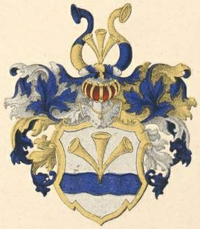 Straelborni suguvõsa aadlivapp